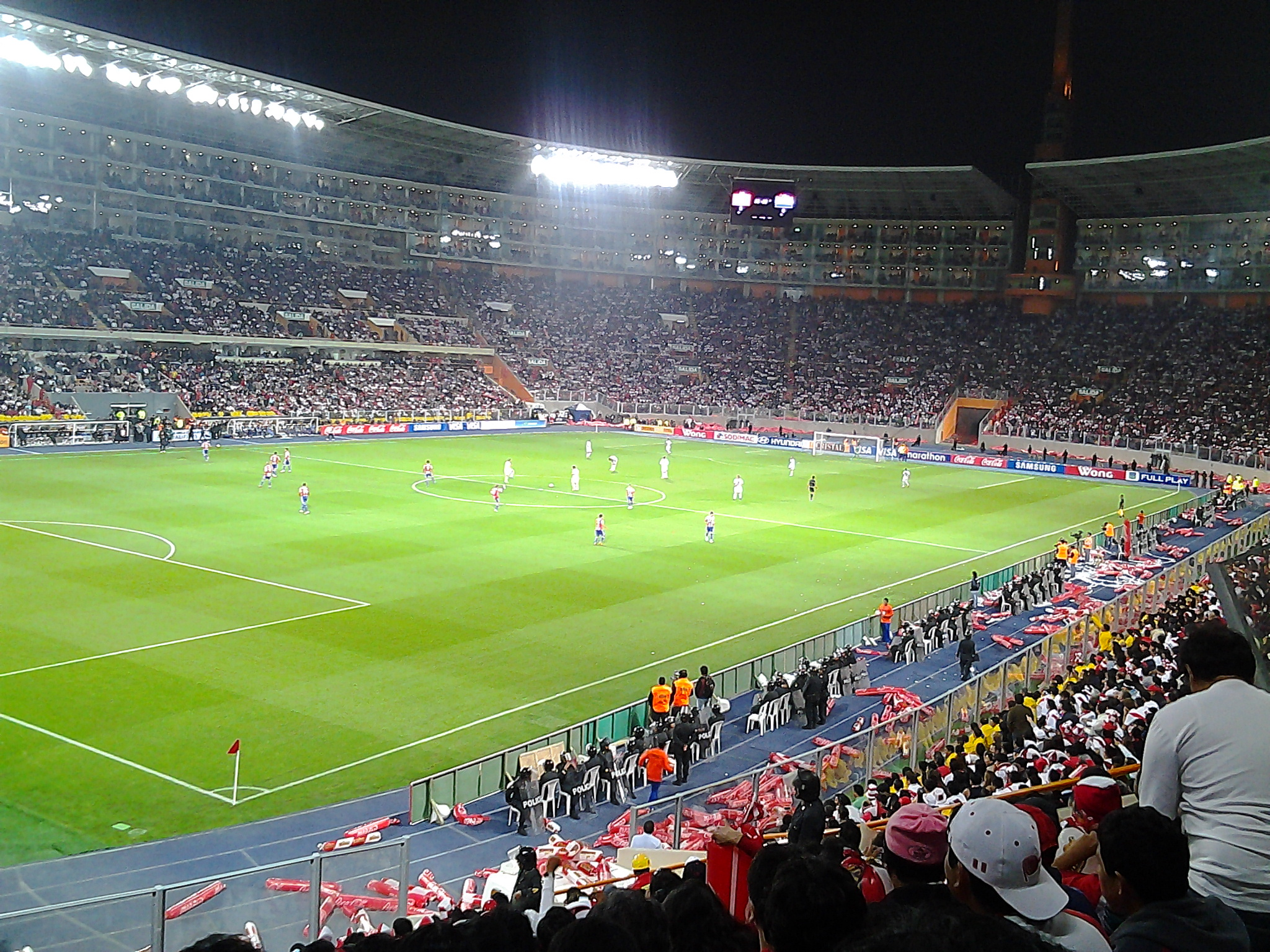 Remodelado Estadio Nacional durante el primer partido por las clasificatorias al mundial Brasil 2014 el 07 de octubre de 2011